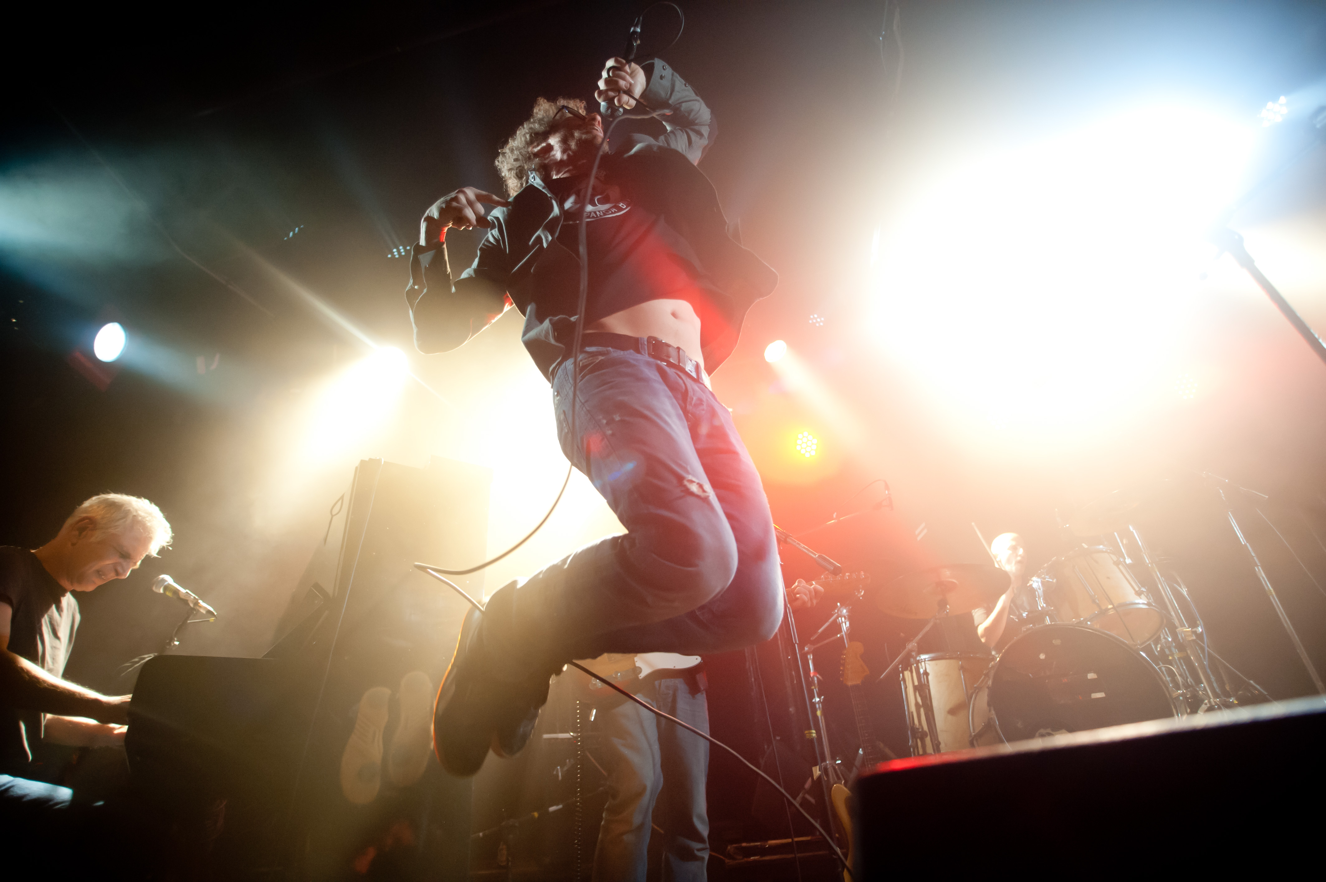 ירמי קפלן בהופעה